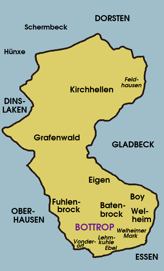 Lageskizze der größeren Stadtteile und der Nachbargemeinden von Bottrop